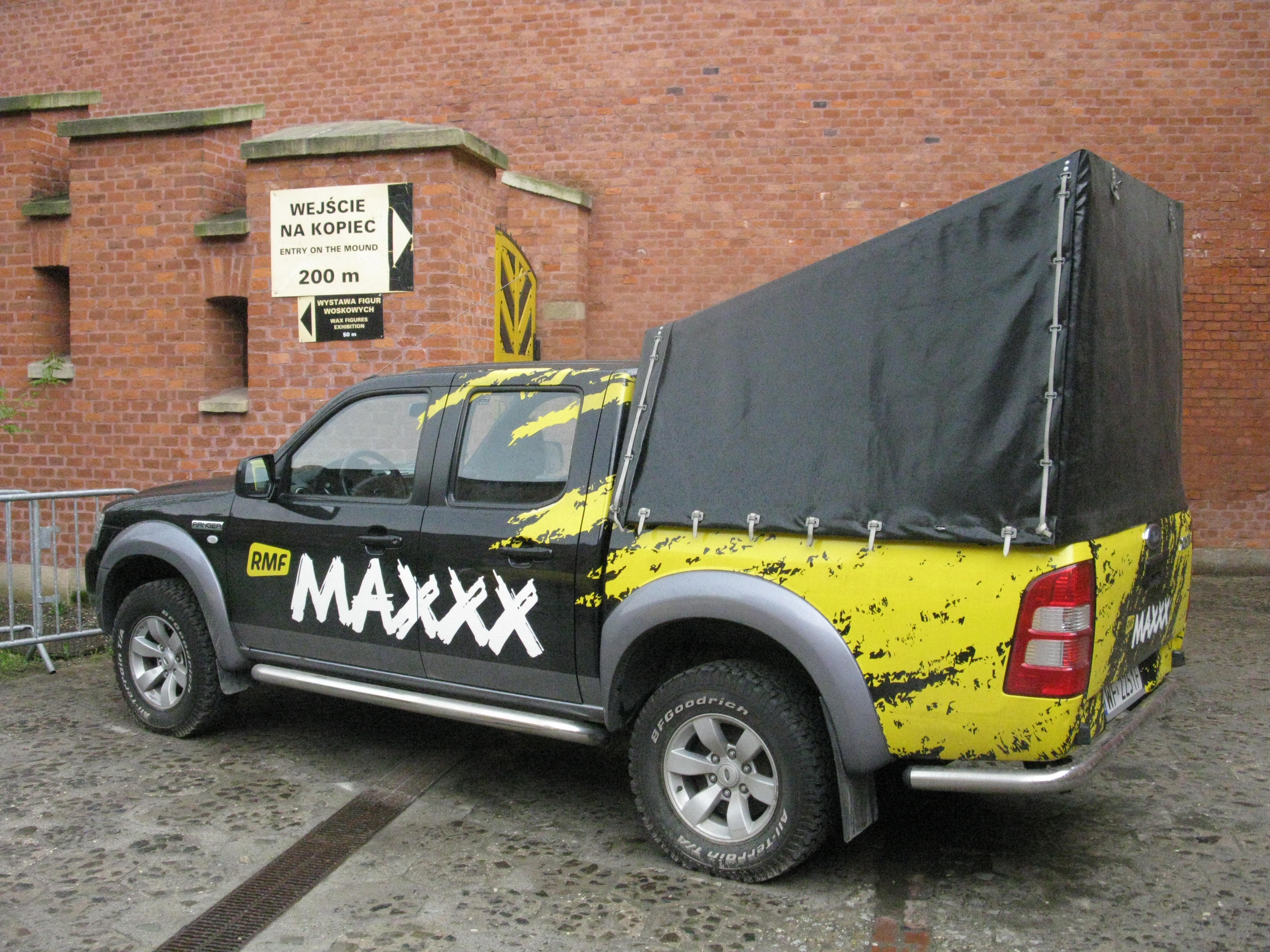 Wóz reporterski RMF Maxxx